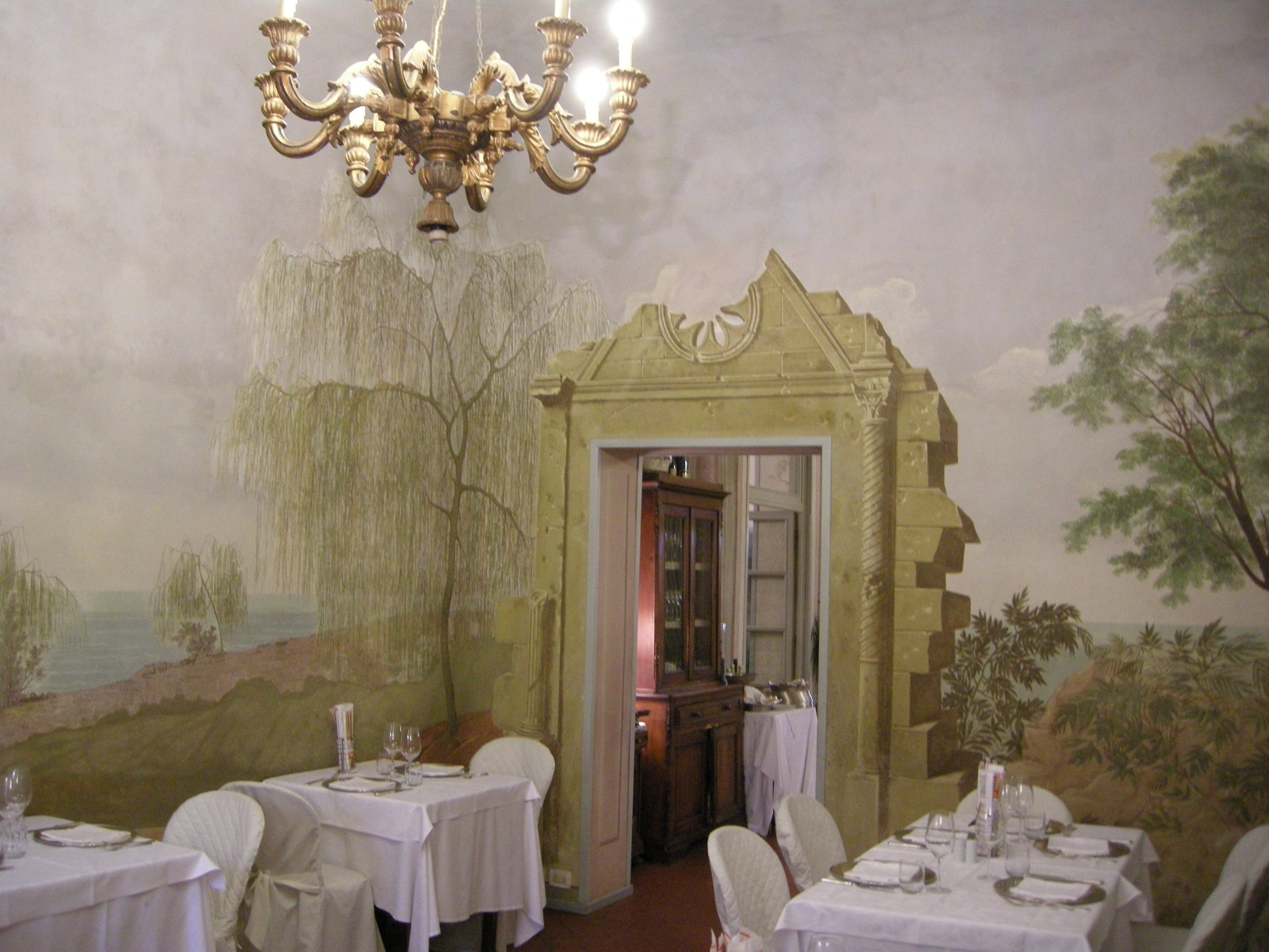 Villa poschi, interno